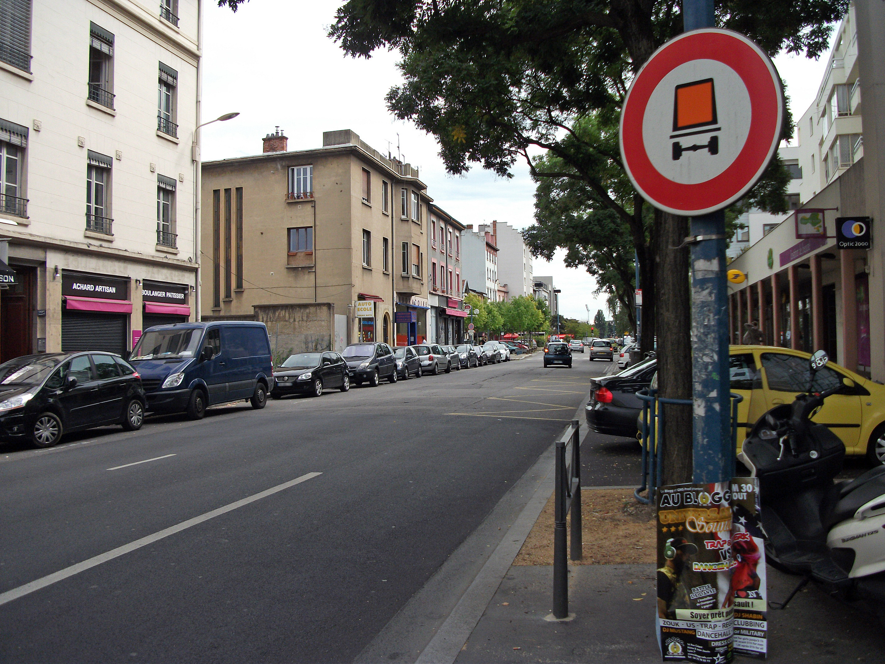 Rue Marcel Mérieux à Lyon, juste au sud de la voie de tramway T1, rue interdite d'accès aux véhicules transportant des matières dangereuses (le panneau, en bon état, a été fabriqué en 1991).